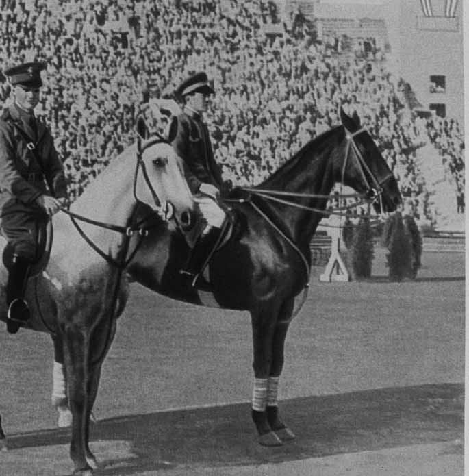 Count Clarence von Rosen (1903-1933)